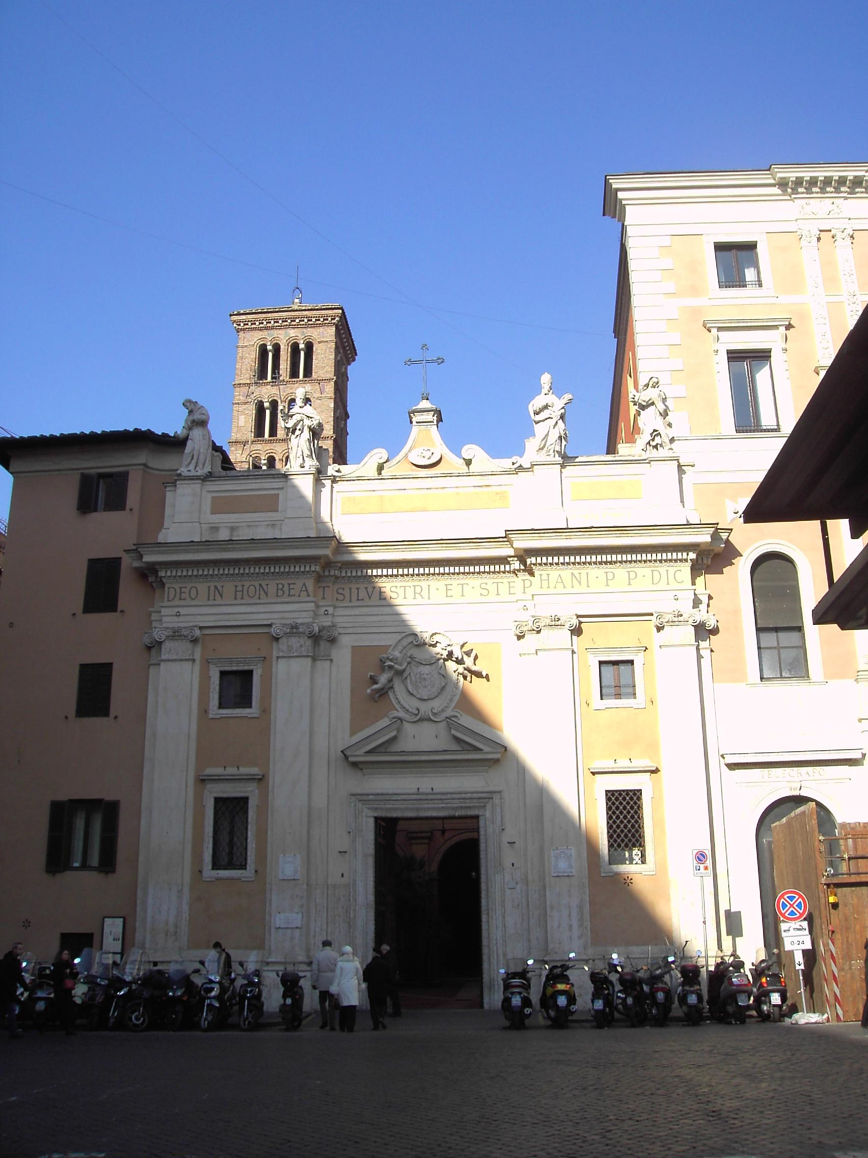 Domenico De Rossi, Facciata di San Silvestro in Capite a Roma [1703]: ingresso al cortile.